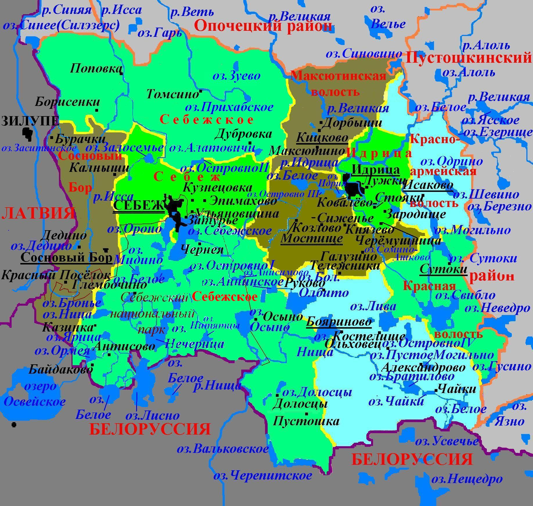 Административная карта Себежского района с изменениями 2010 года (984-ОЗ, 1032-ОЗ)